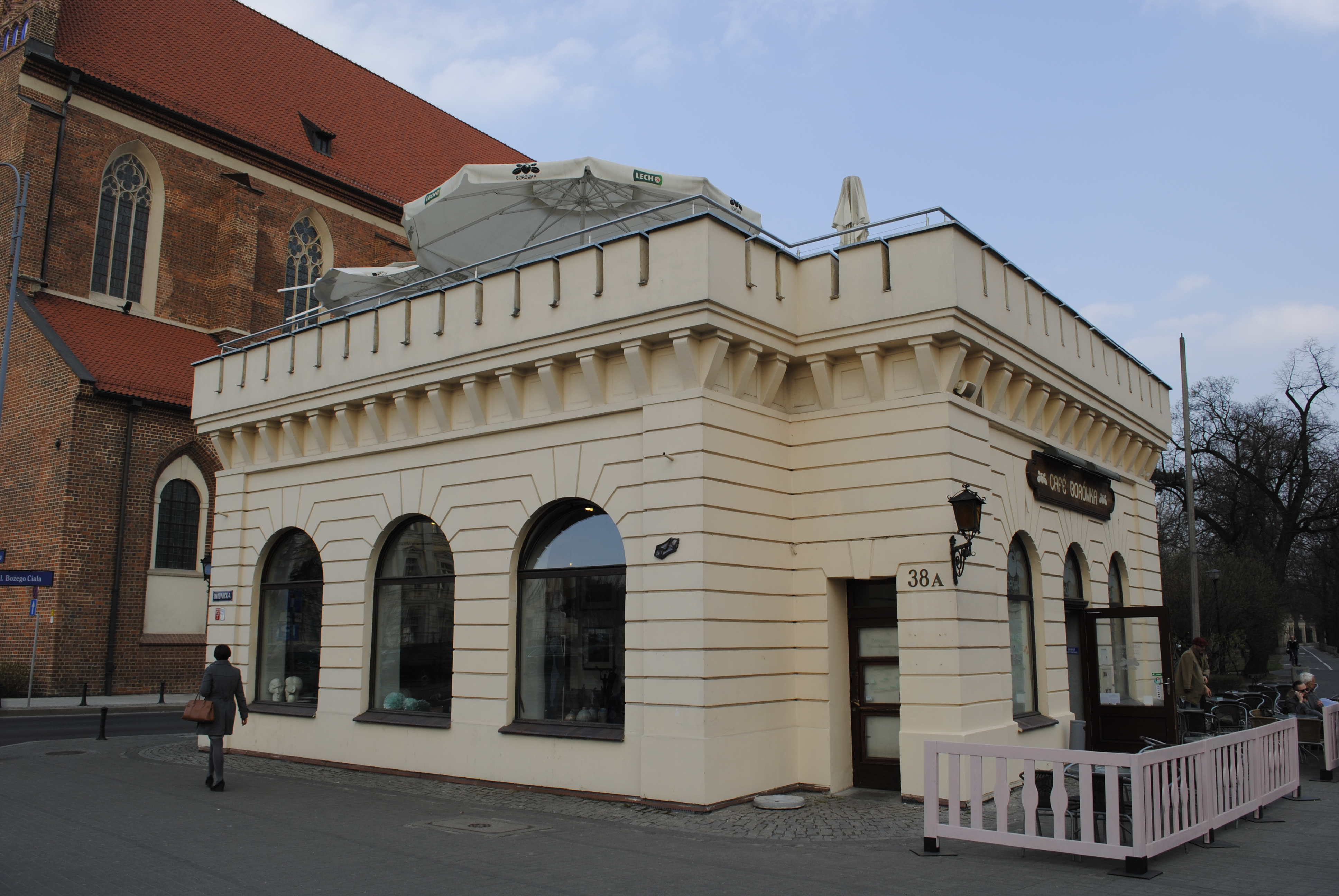 Alte Hauptwache an der Schweidnitzer Straße in Breslau